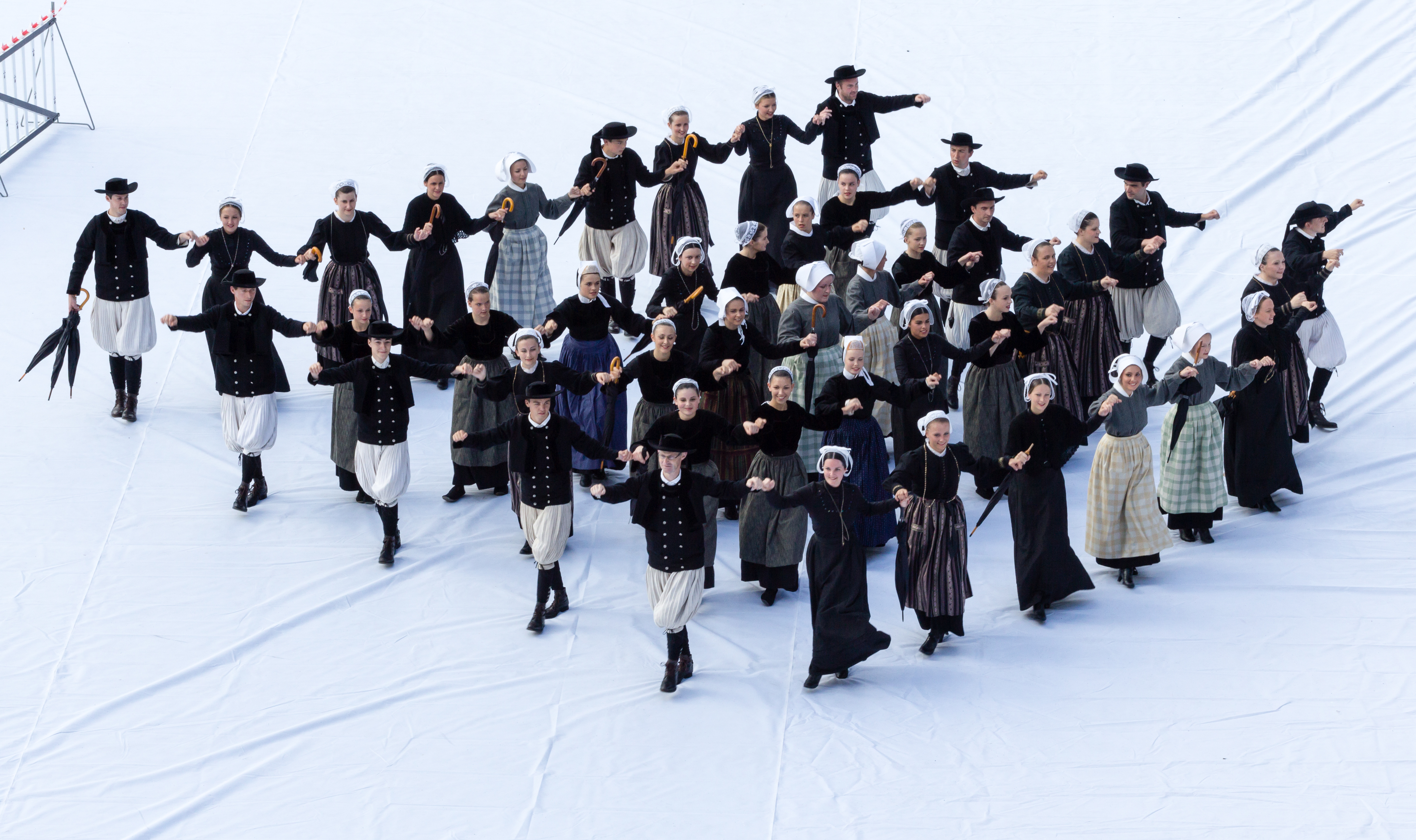 FIL 2012 - Arrivée de la grande parade des nations celtes - Beuzeg ar C'hap